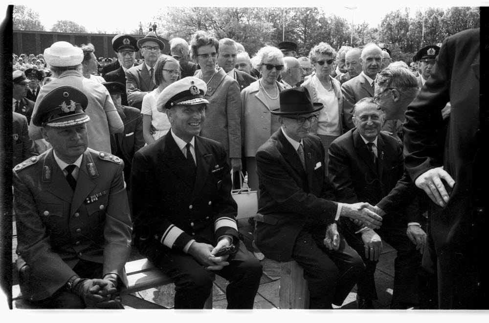 Gedenkfeier für die Gefallenen beider Weltkriege am Marine-Ehrenmal in Laboe.